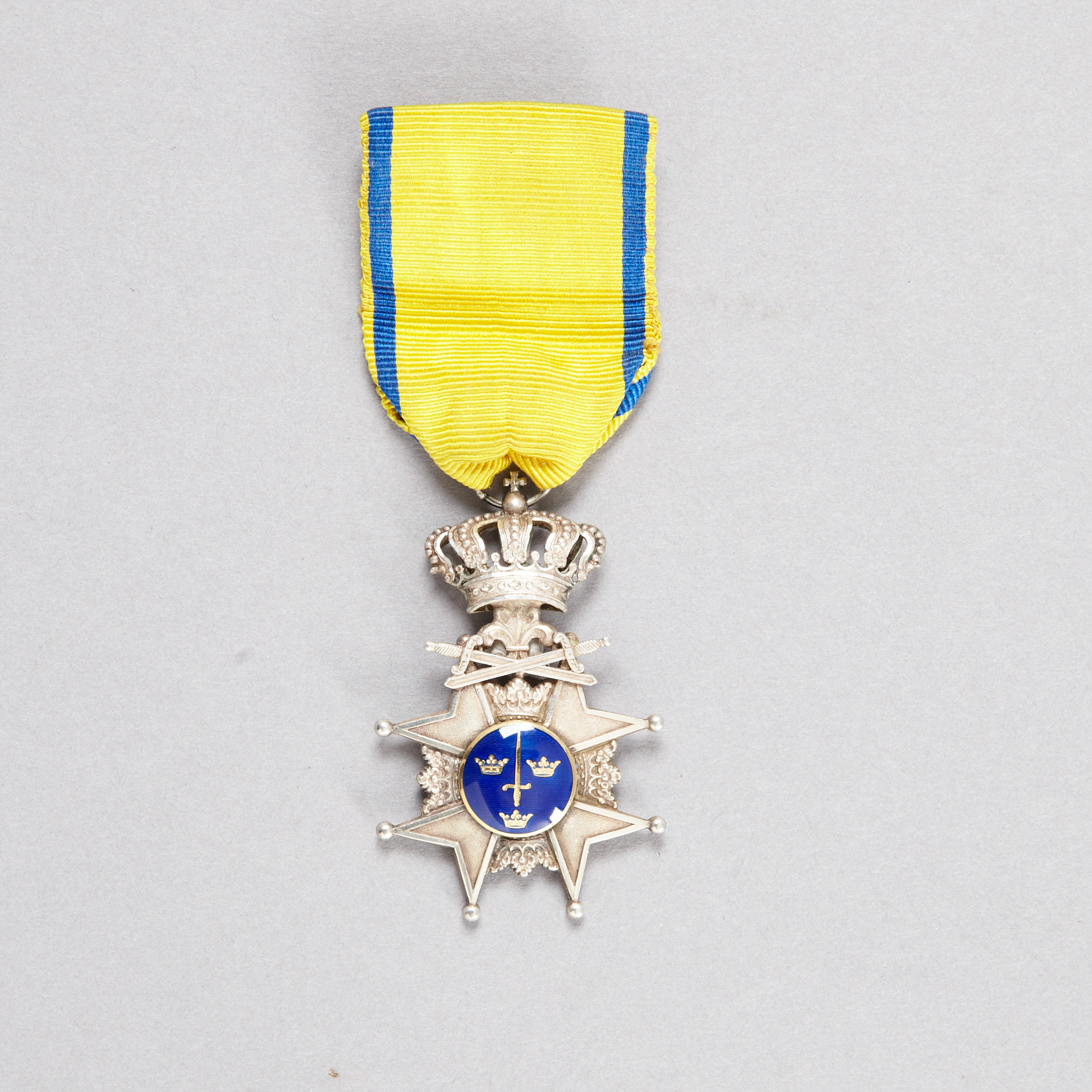 Svärdstecknet som tillhör Svärdsorden.